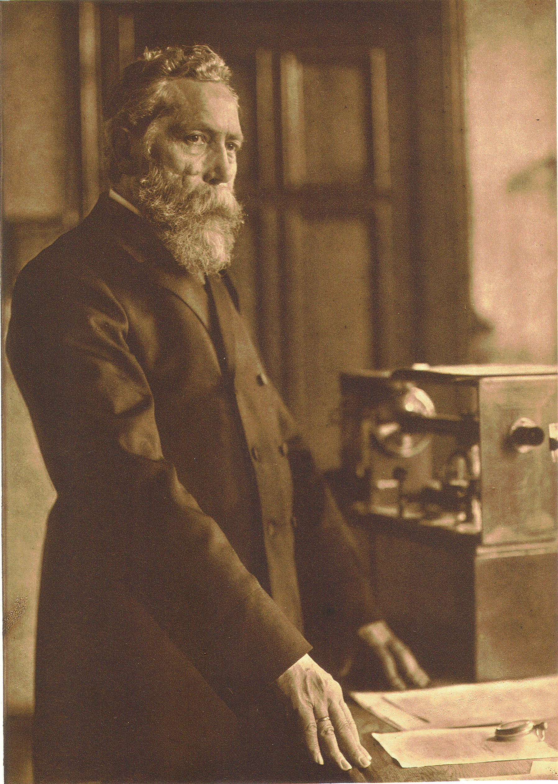 Carl August Voller (1842-192), deutscher Professor, MdHB